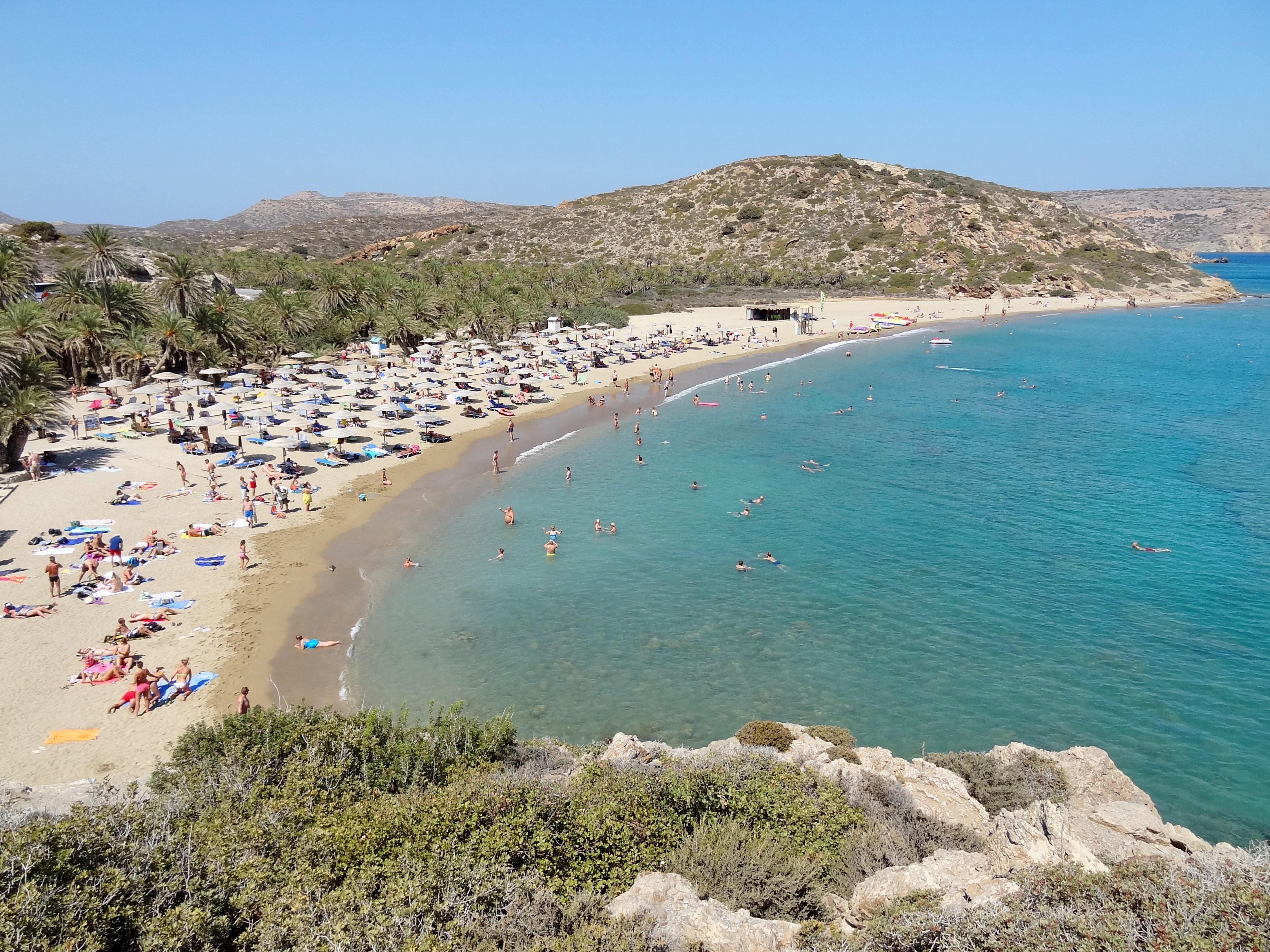 Palmenstrand von Vai (Βάι) an der Nordostküste Kretas, Gemeinde Sitia, Kreta, Griechenland